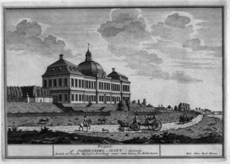 "Prospect af Sophienberg=Slott i Sædland..."